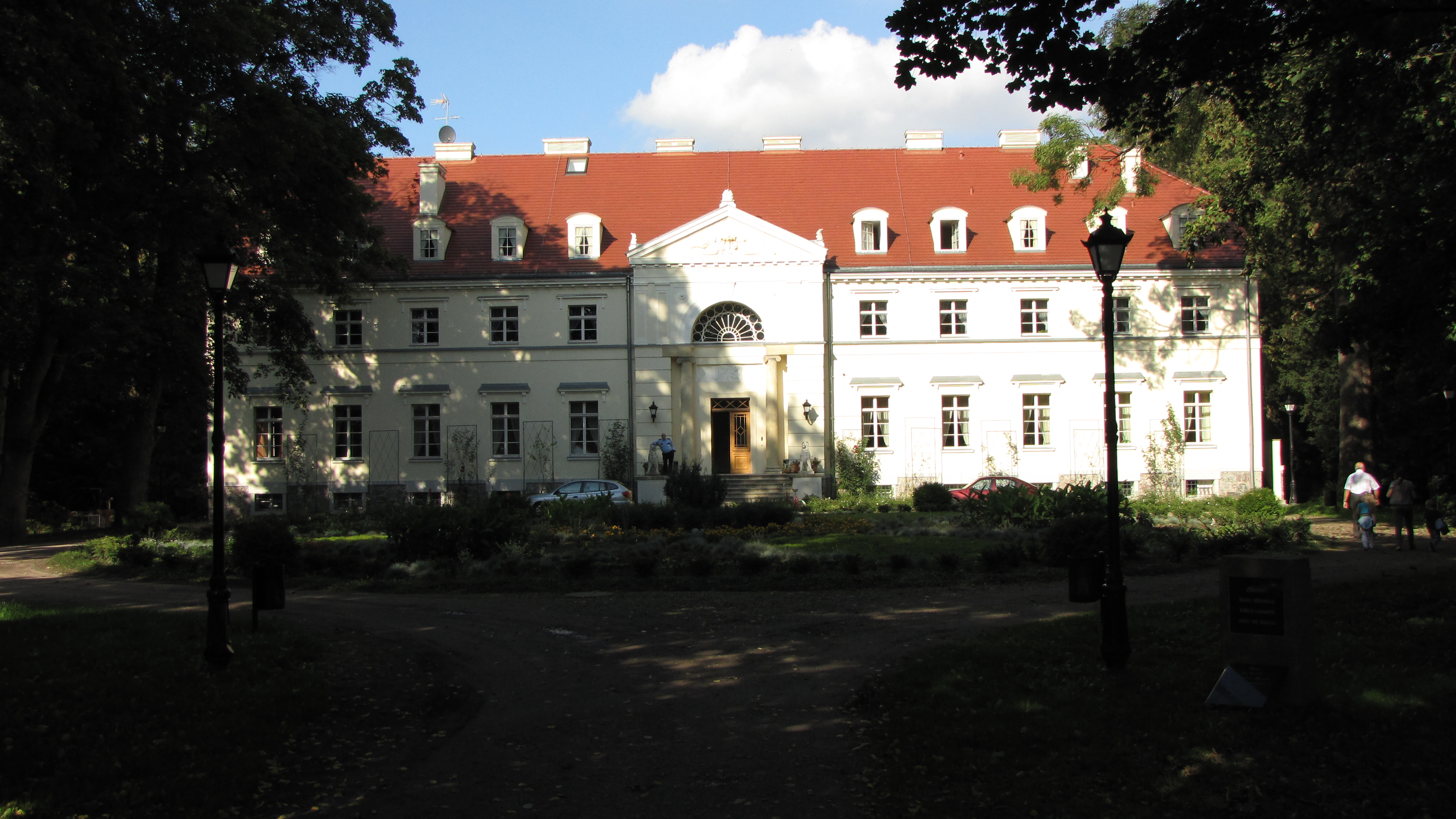 Przelewice - pałac